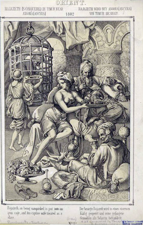 1402: Bajazeth, conquered by Timur near Angora/Ancyra, is put into an iron cage and his captive wife (Olivera Despina, Olivera Lazerevich) treated as a slave 1402: Der in der Schlacht bei Ankara besiegte Bajazeth wird in einen eisernen Käfig gesperrt, seine gefangene Gemahlin als Sklavin behandelt